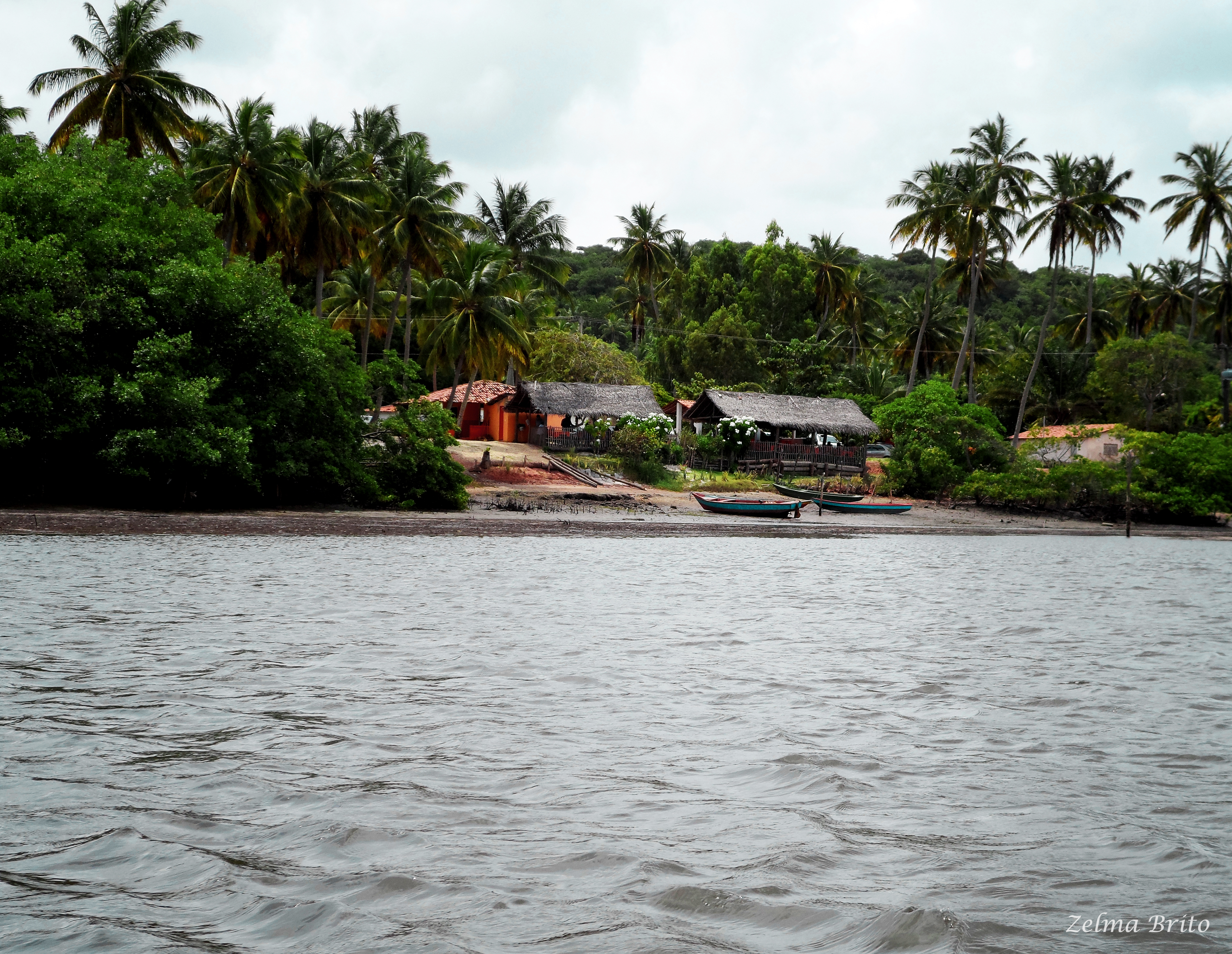 Camurupim - Marcação - Paraíba